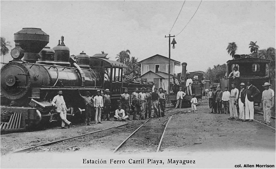 Estacion Ferro Caril Playa, Mayaguez. The postcard shows the "Playa" station of the American Railroad about 1905. The letters "A. R .R." on the cab of the Baldwin locomotive can barely be decifered. The ARR was reorganized that in 1947 Puerto Rico Railroad & Transport Co. It discontinued passenger service in 1953 and ended all rail operations in 1957.